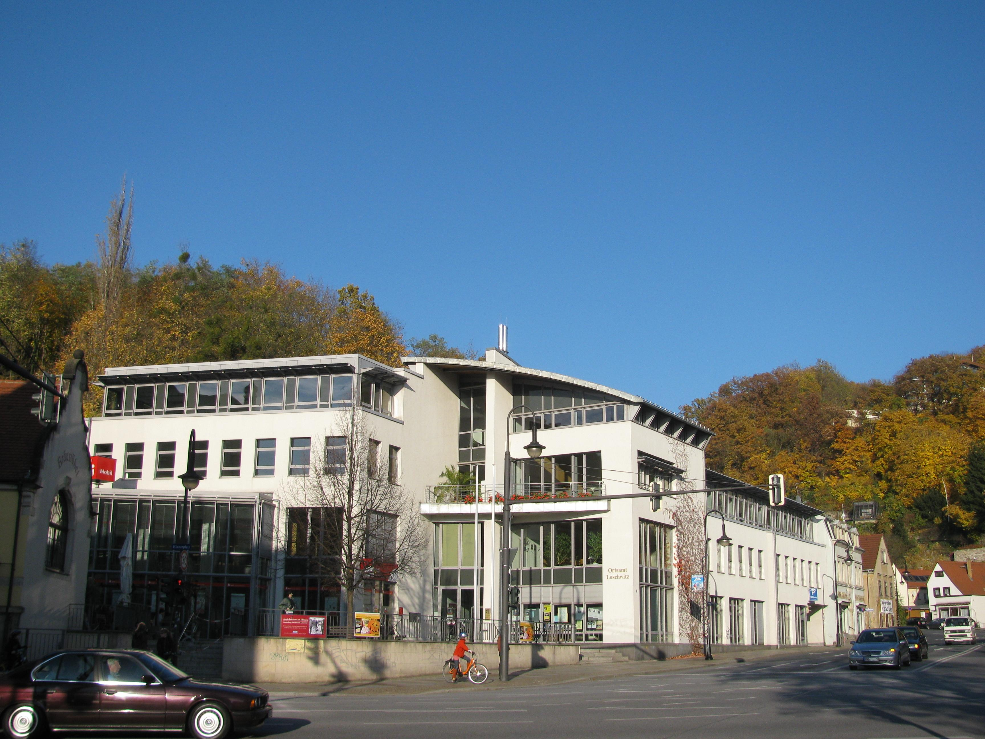 Ortsamt Loschwitz, Körnerplatz, Dresden